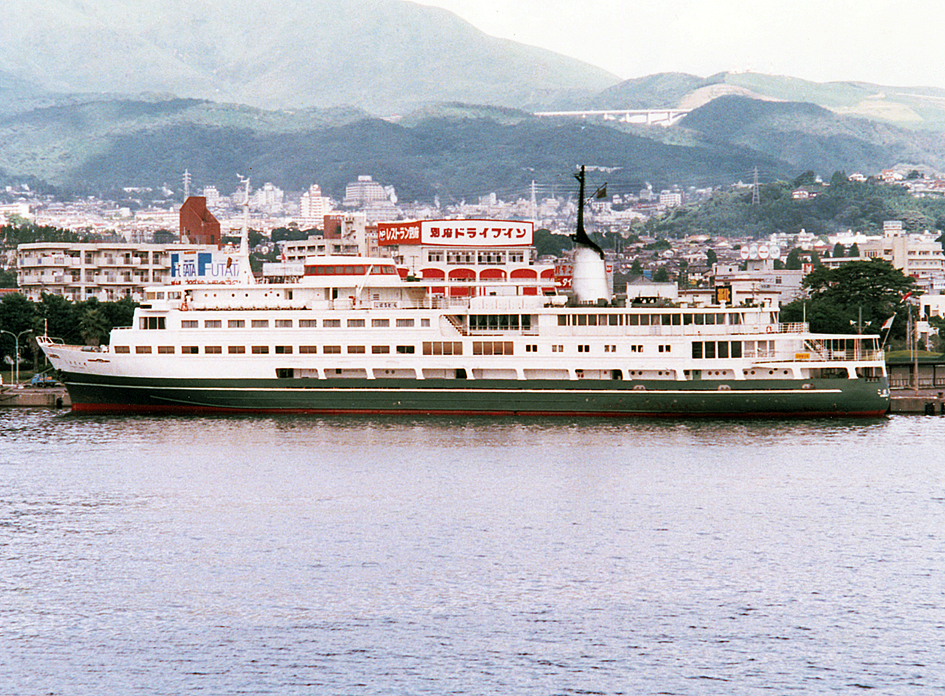 関西汽船 こばると丸